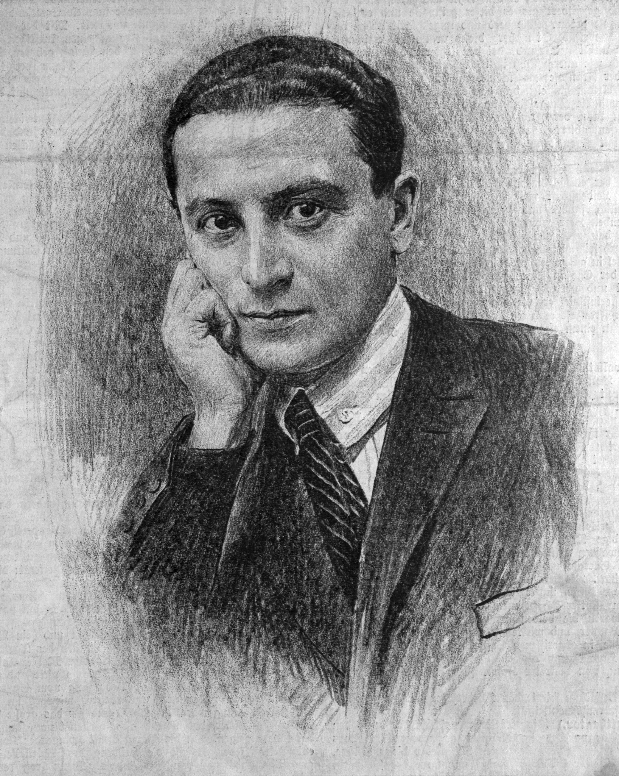 Portrait von Michael Krasznay-Krausz (1897-1940)